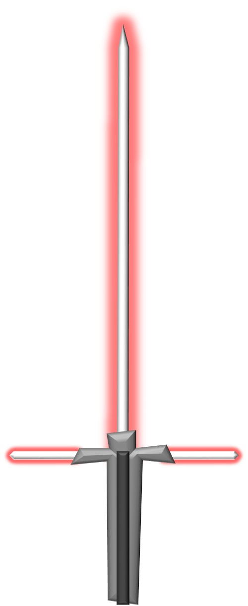 חרב האור של קיילו רן